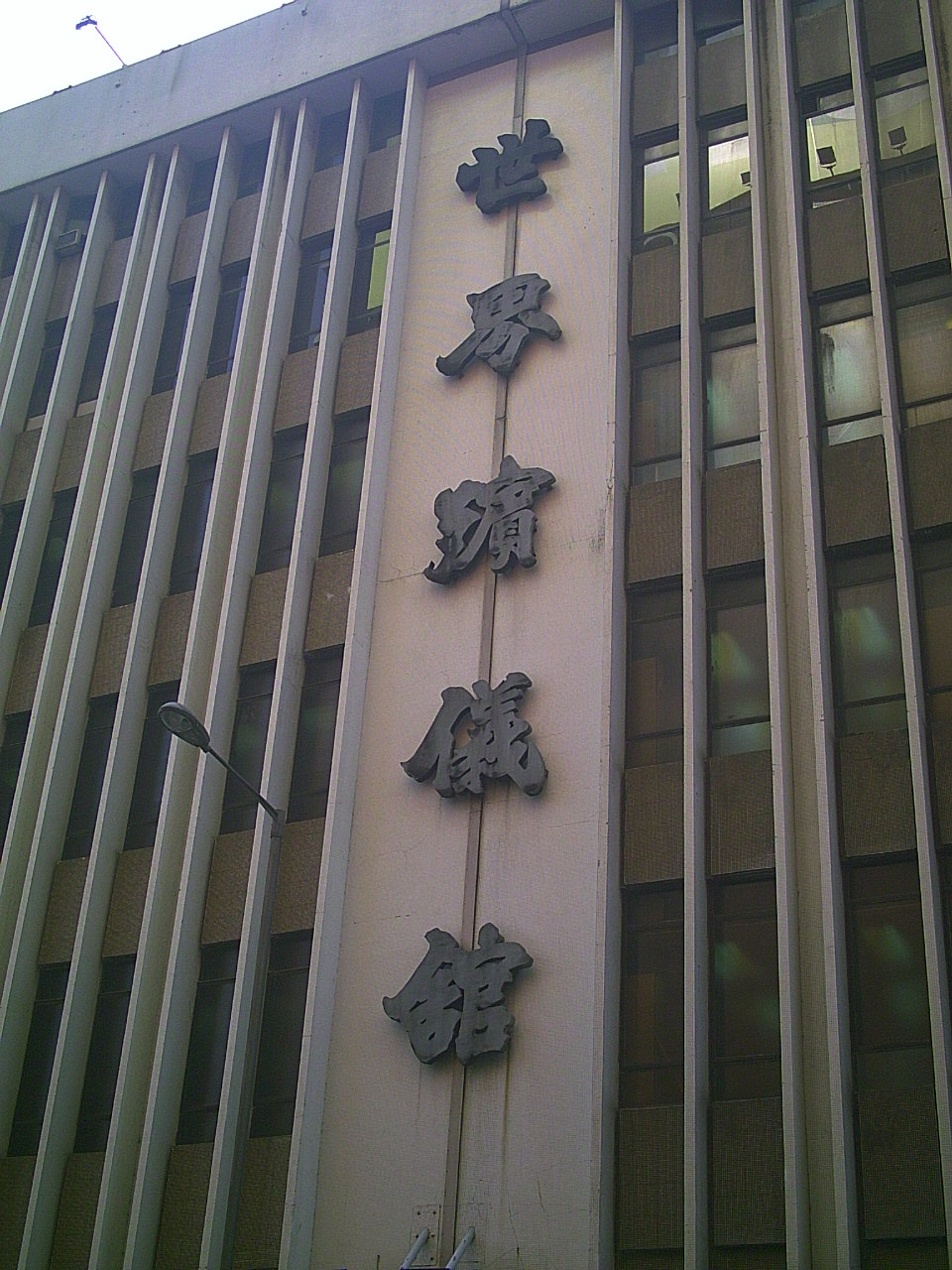 世界殯儀舘，全名世界殯儀舘有限公司（Universal Funeral Parlour ）是香港一間殯儀館，位於九龍紅磡，於1975年11月28日成立，為香港主要的殯儀館之一。 Photo created by User:RockLi.